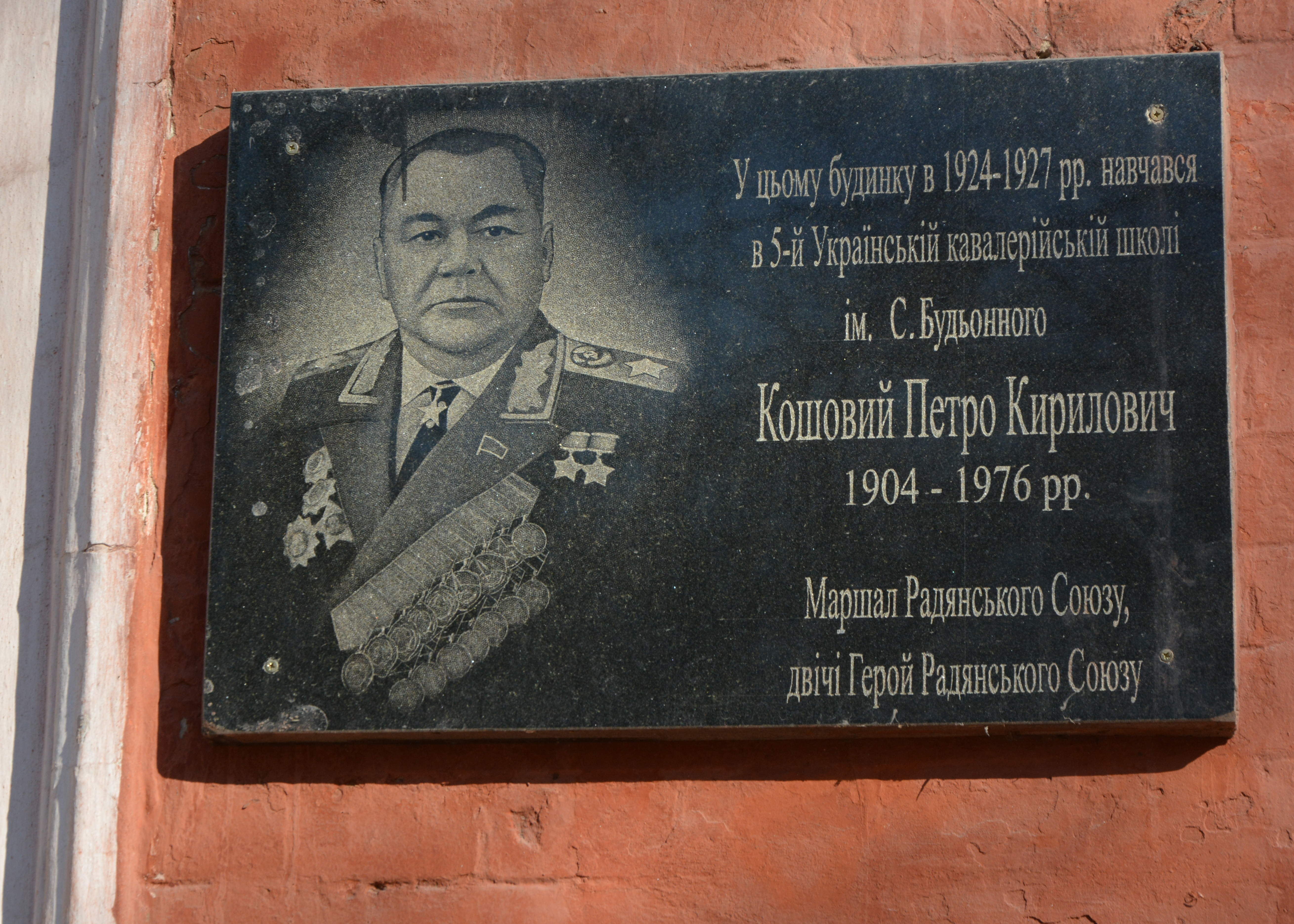 Навчальний корпус на 3 поверхи, Кіровоград, вул. Кавалерійська, 13